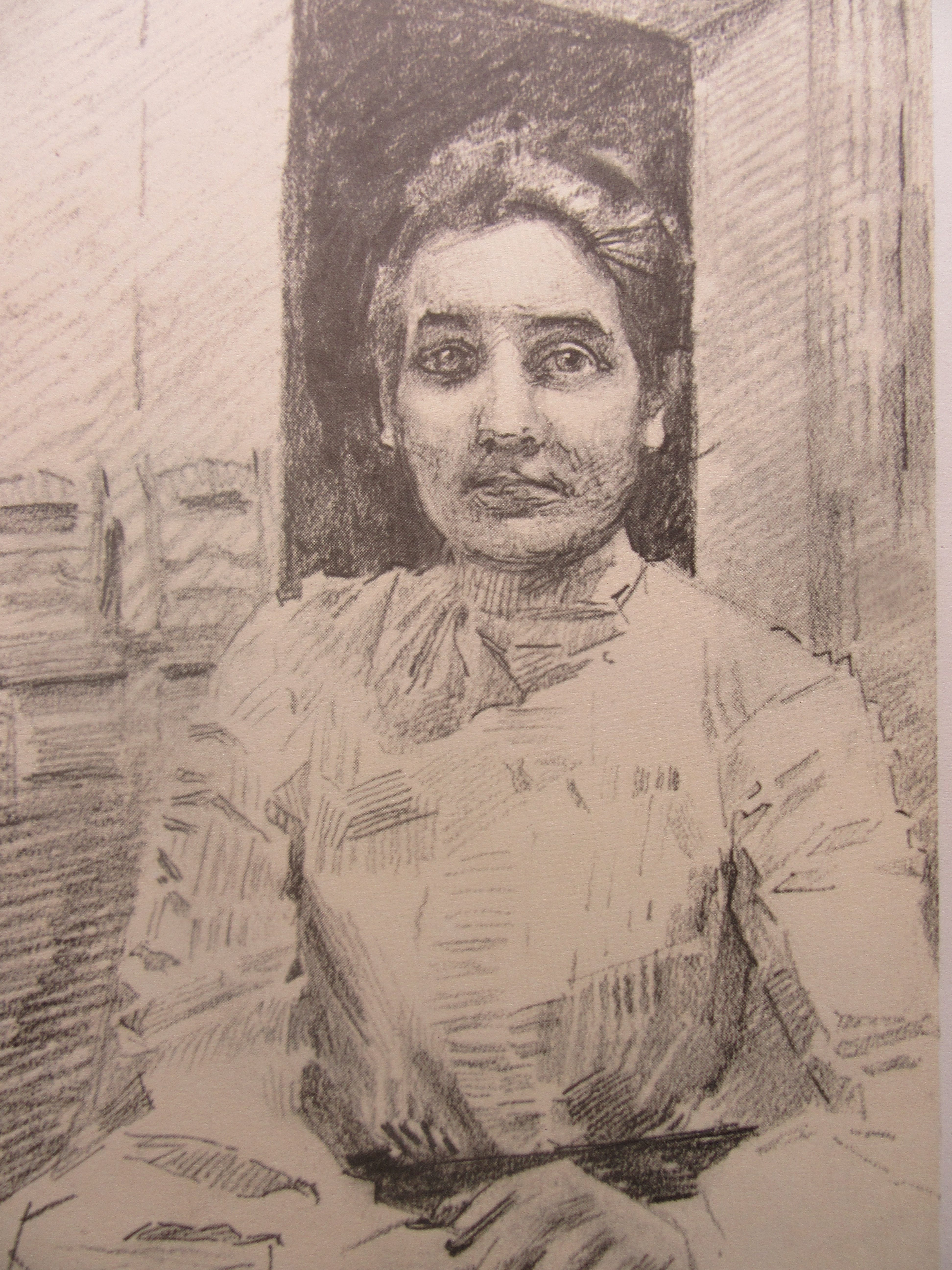 Surveillante à la clinique de Moscou